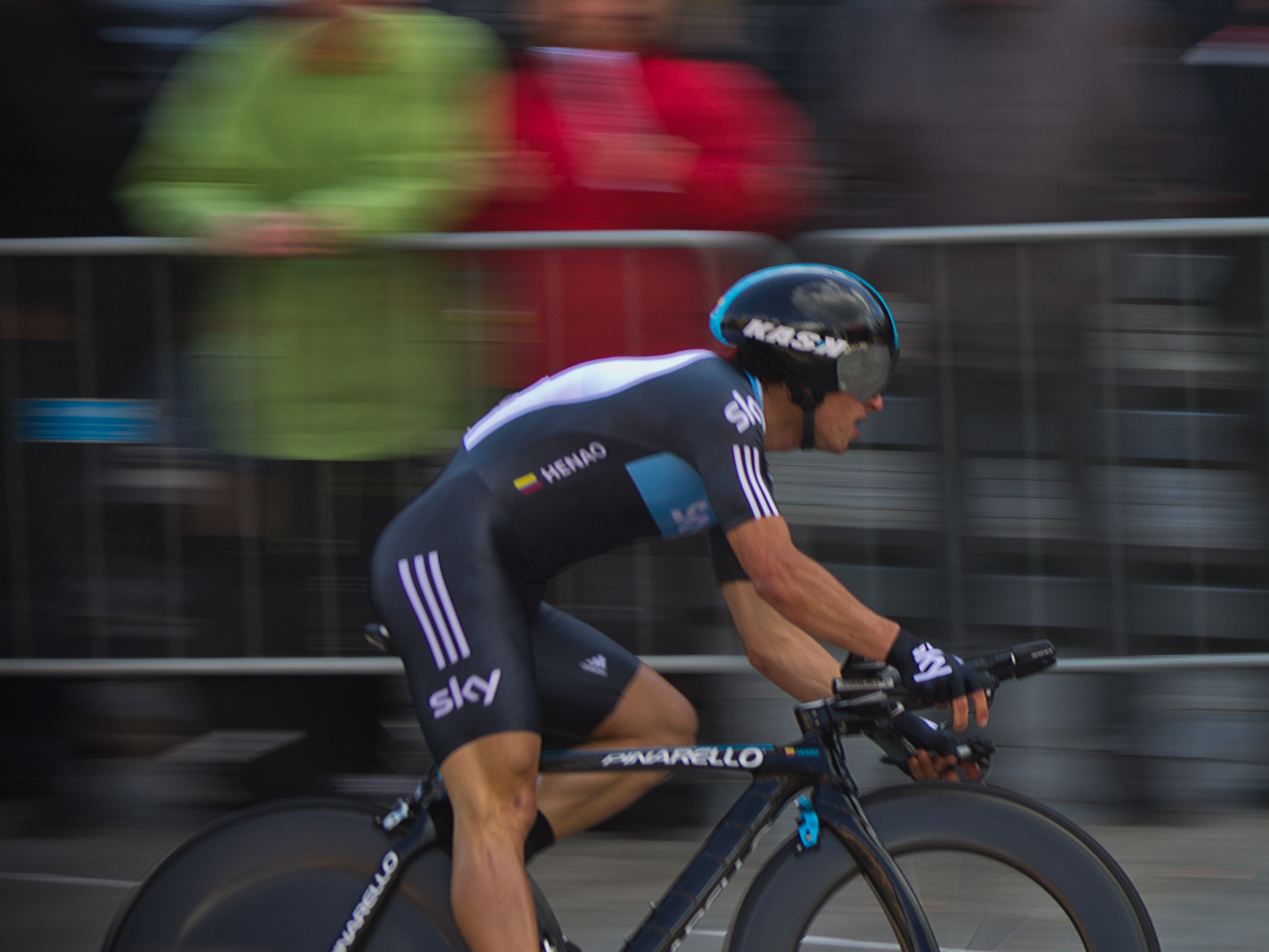 HENAO MONTOYA Sergio Luis #184